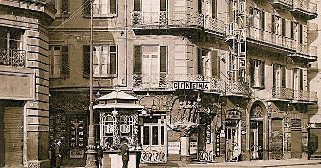 Napoli . Cinema Sala Iride presso l'Hotel Nazionale in via A. Poerio (angolo Piazza Garibaldi). Autore sconosciuto.